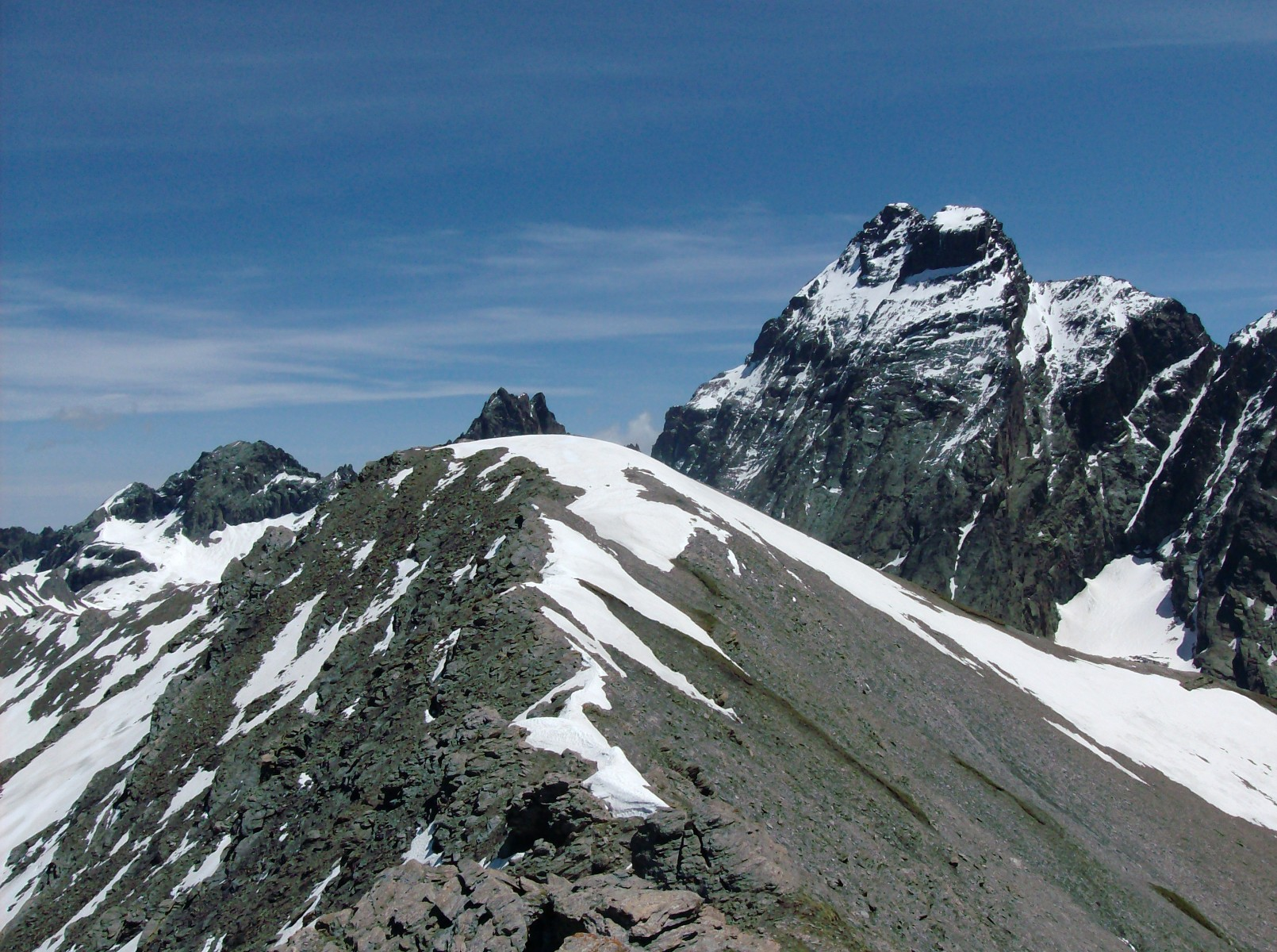 La Punta Tre Chiosis (3080 m) vista dalla vetta secondaria occidentale (quota 3052). Sullo sfondo, il Monviso ed il Viso di Vallanta.